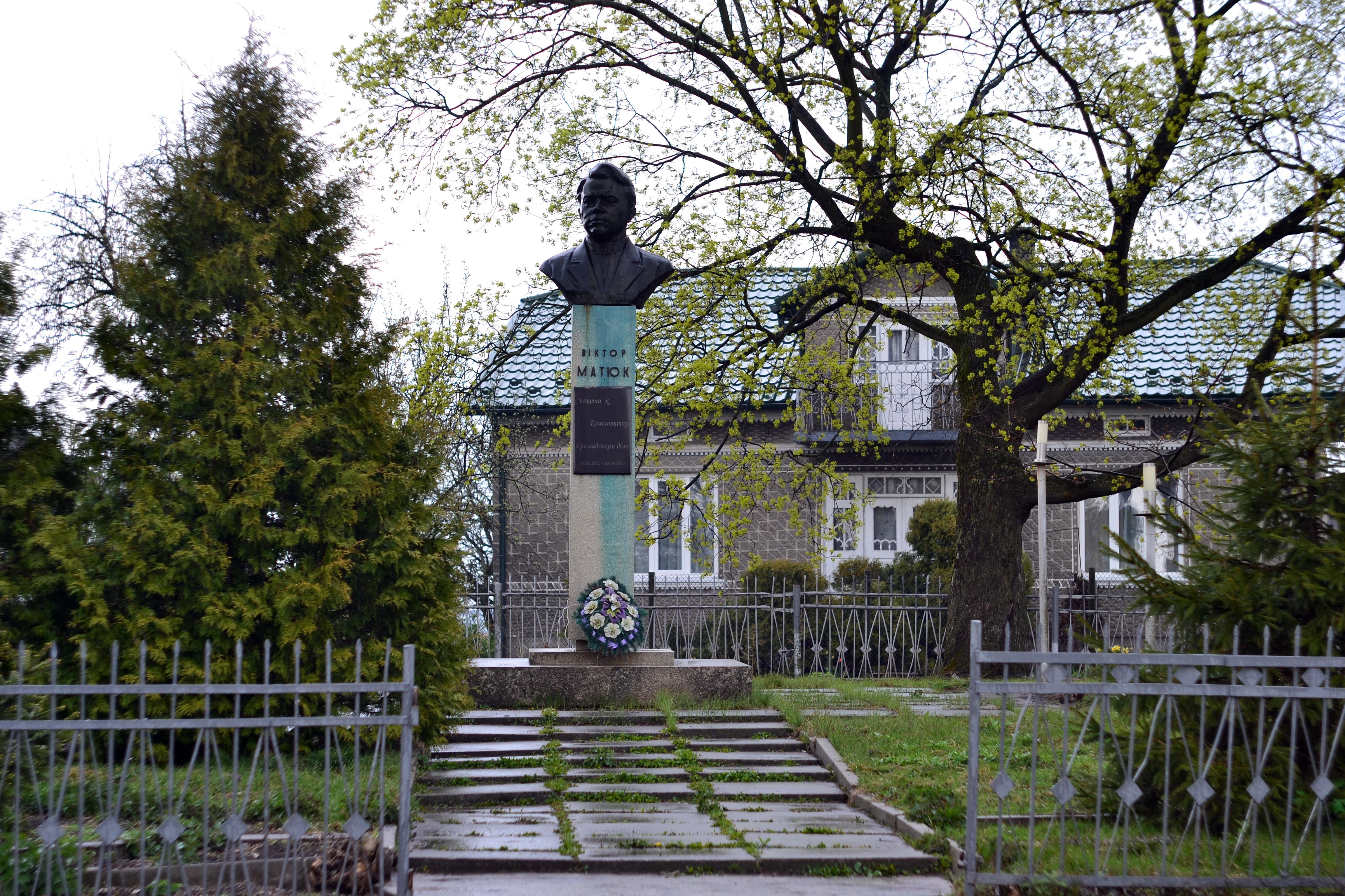 Пам'ятник Матюку В.Г., українському композитору (скульптор О. Пилєв, метал) (1993 рік) - Тудорковичі (Федорівці) (навпроти церкви) Сокальський район Львівська область Україна